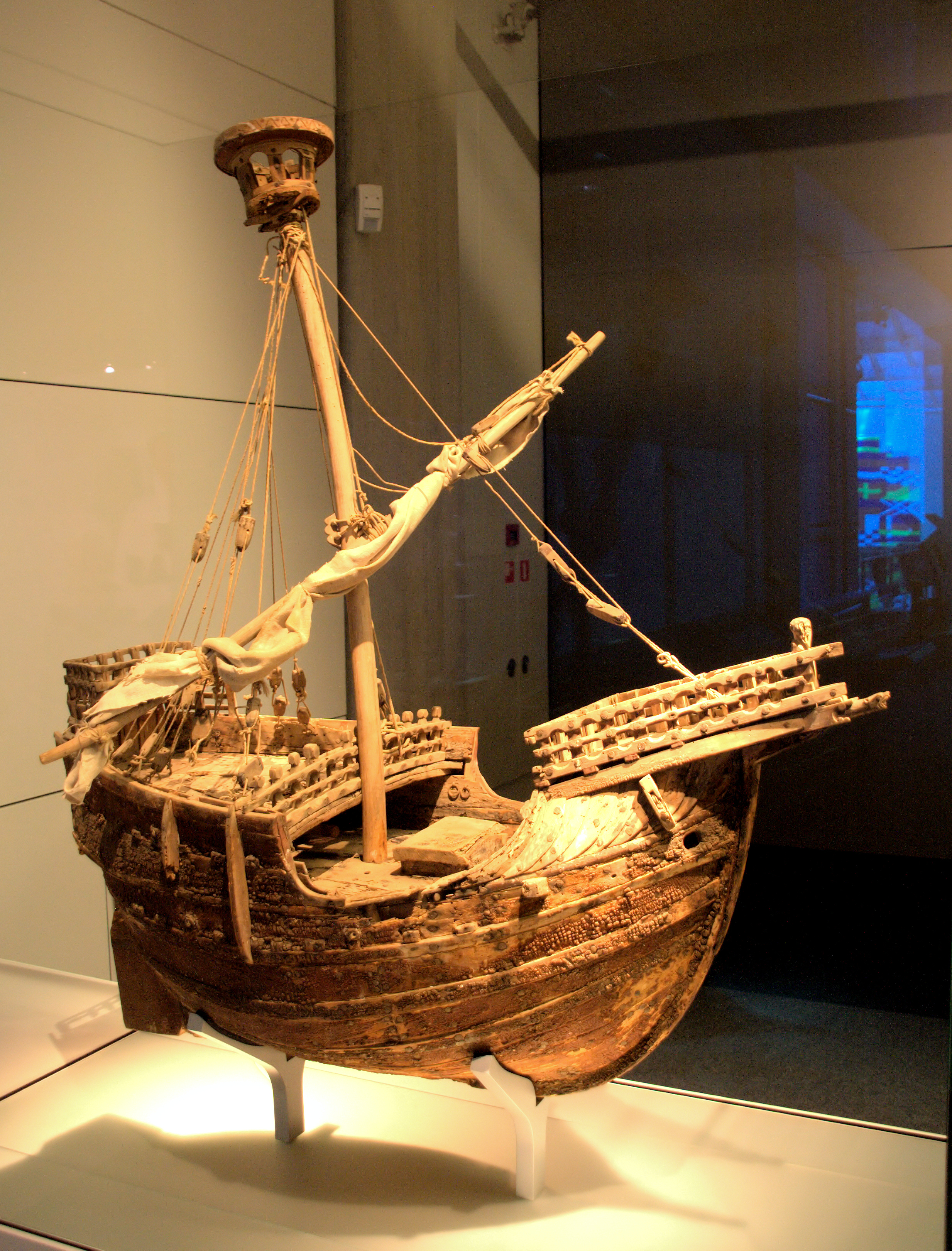 Mataro Model (Matarowand) Maritiem Museum - Mataro Model